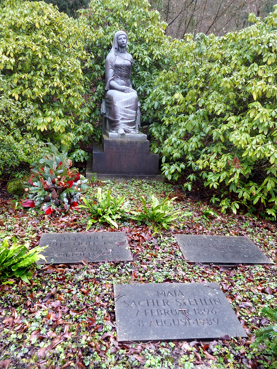 Maja Sacher-Stehlin (1896–1989) Bildhauerin, Mäzenin, Familiengrab auf dem Friedhof Hörnli, Riehen, Basel-Stadt